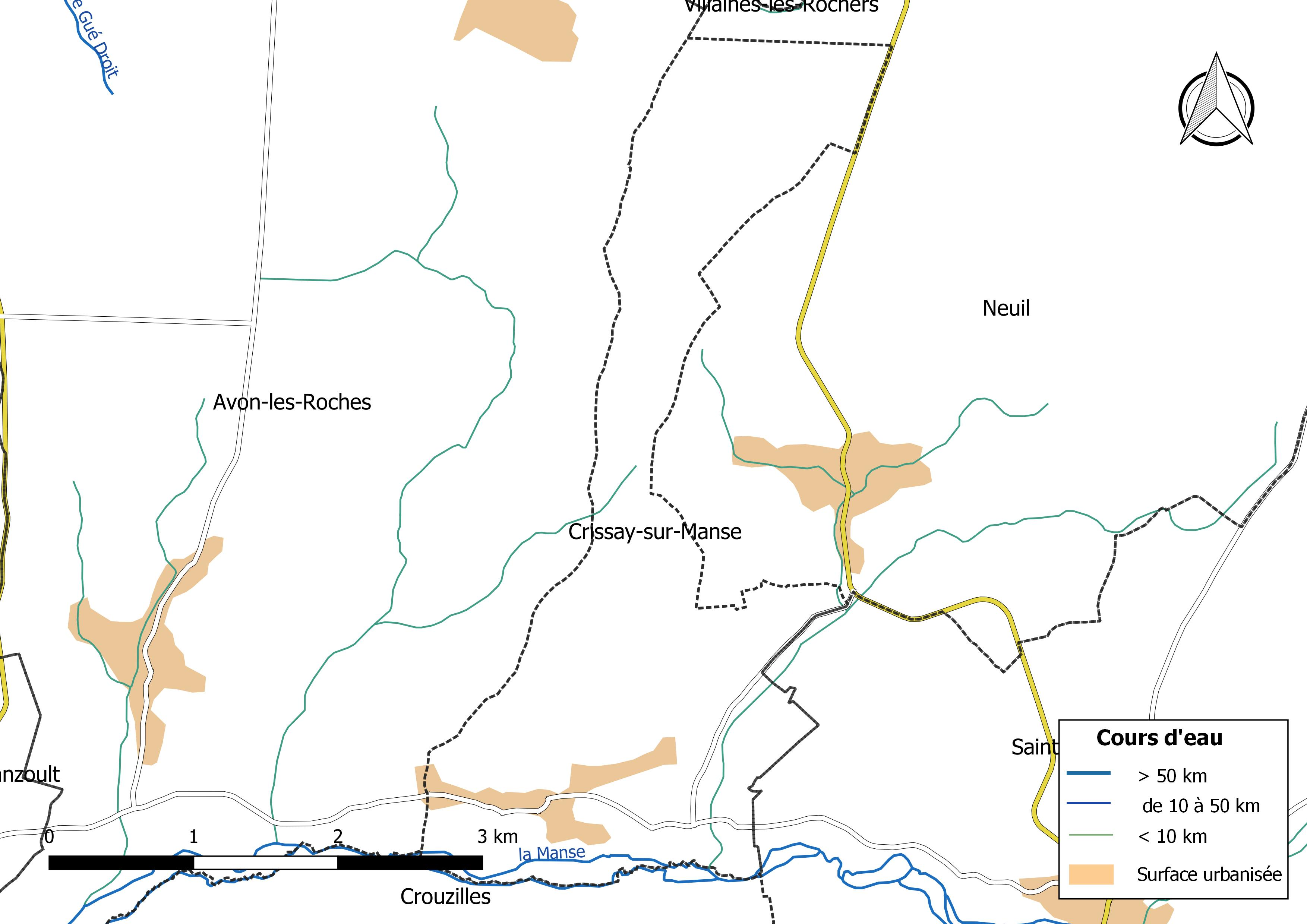 Carte du réseau hydrographique de la commune de Crissay-sur-Manse (France).